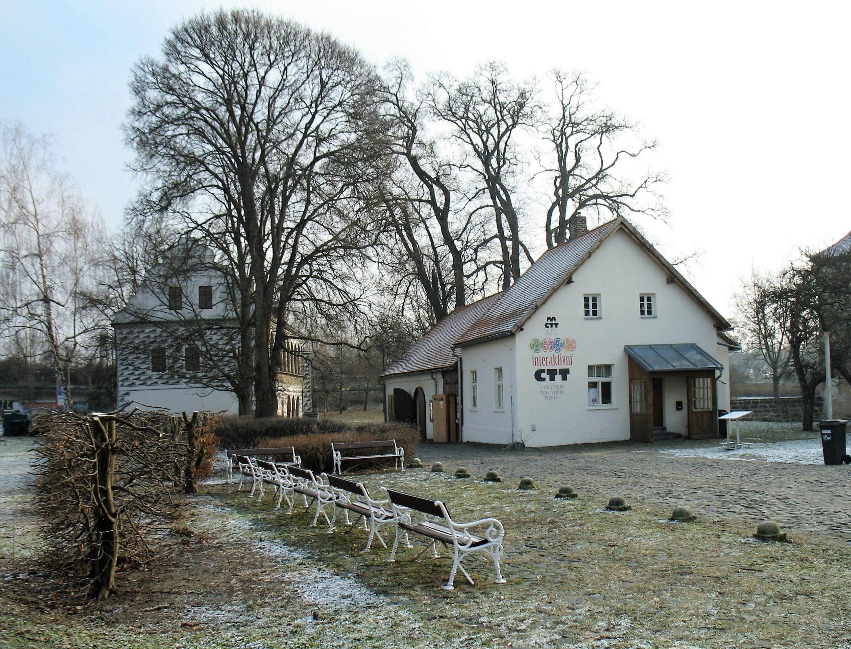 Renesanční Červený dům a Centrum textilního tisku v České Lípě. Pohled z Erbenovy ulice